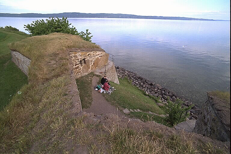 Motiv: Näs borgruin Nyckelord: Raä-Fastigheter, Riksintressen Kategori: Borg .